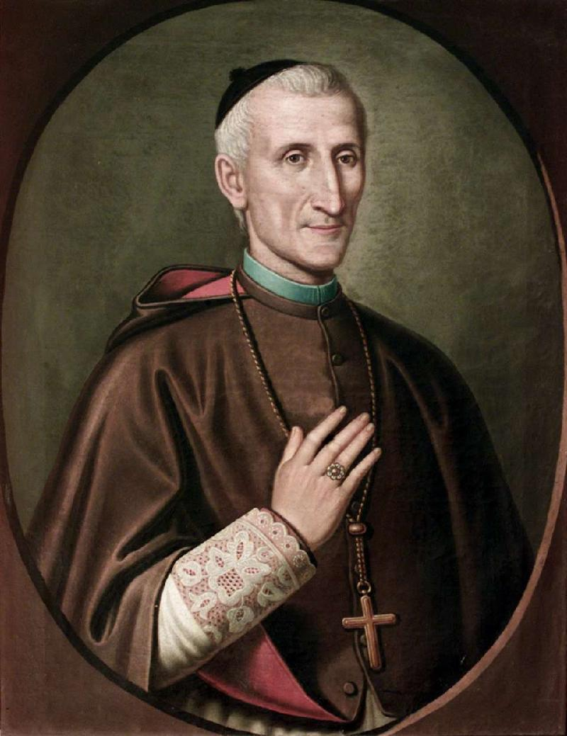 Ritratto del vescovo Pietro (Pier) Luigi Speranza / Diocesi di Bergamo (BeWeb)